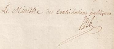 Signature de Louis Hardouin Tarbé (1753-1806).